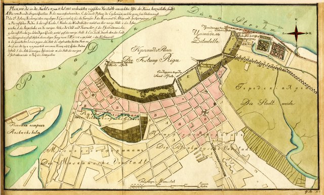 Scan from Johann Christoph Brotze's book Sammlung verschiedner Liefländischer Monumente. Plan, wie die in der Nacht von 11 zum 12 Jul 1812 verbrannten rigischen Vorstaedte am rechten Ufer der Düna herzustellen sind.